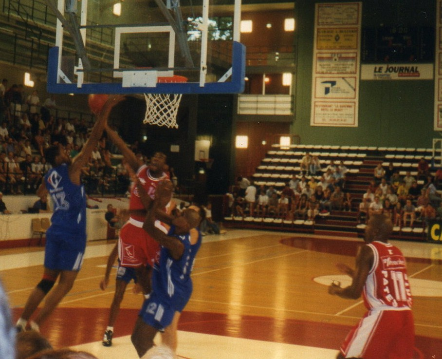 Match amical à la Maison des Sports, match d'avant saison entre l'Elan Chalon et la JDA Dijon en Aout 1997.